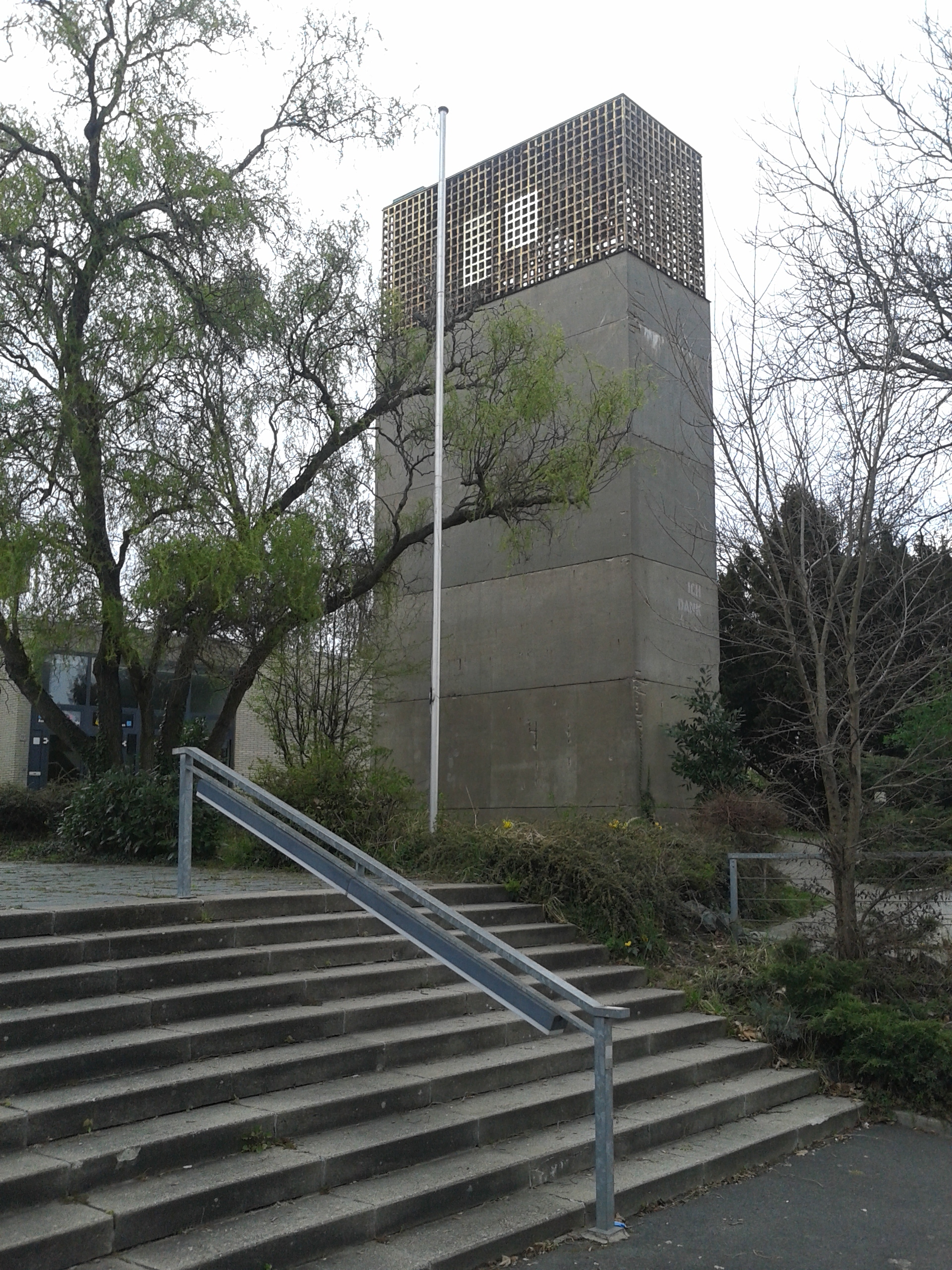 Baudenkmal Am Fort Gonsenheim 151 Mainz